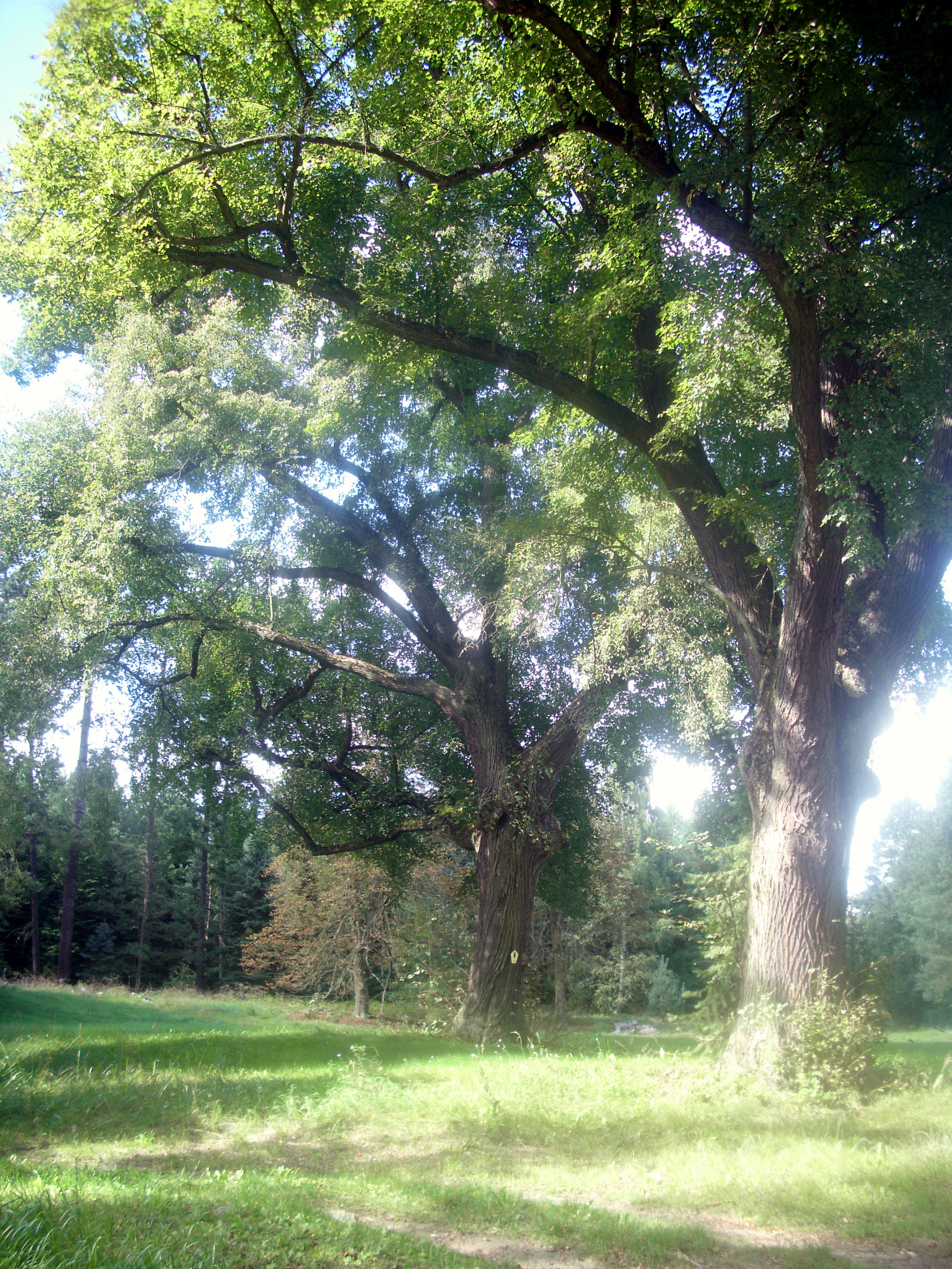 geschützte Bäume am Forsthaus Jankemühle, Naturpark Schlaubetal, Brandenburg